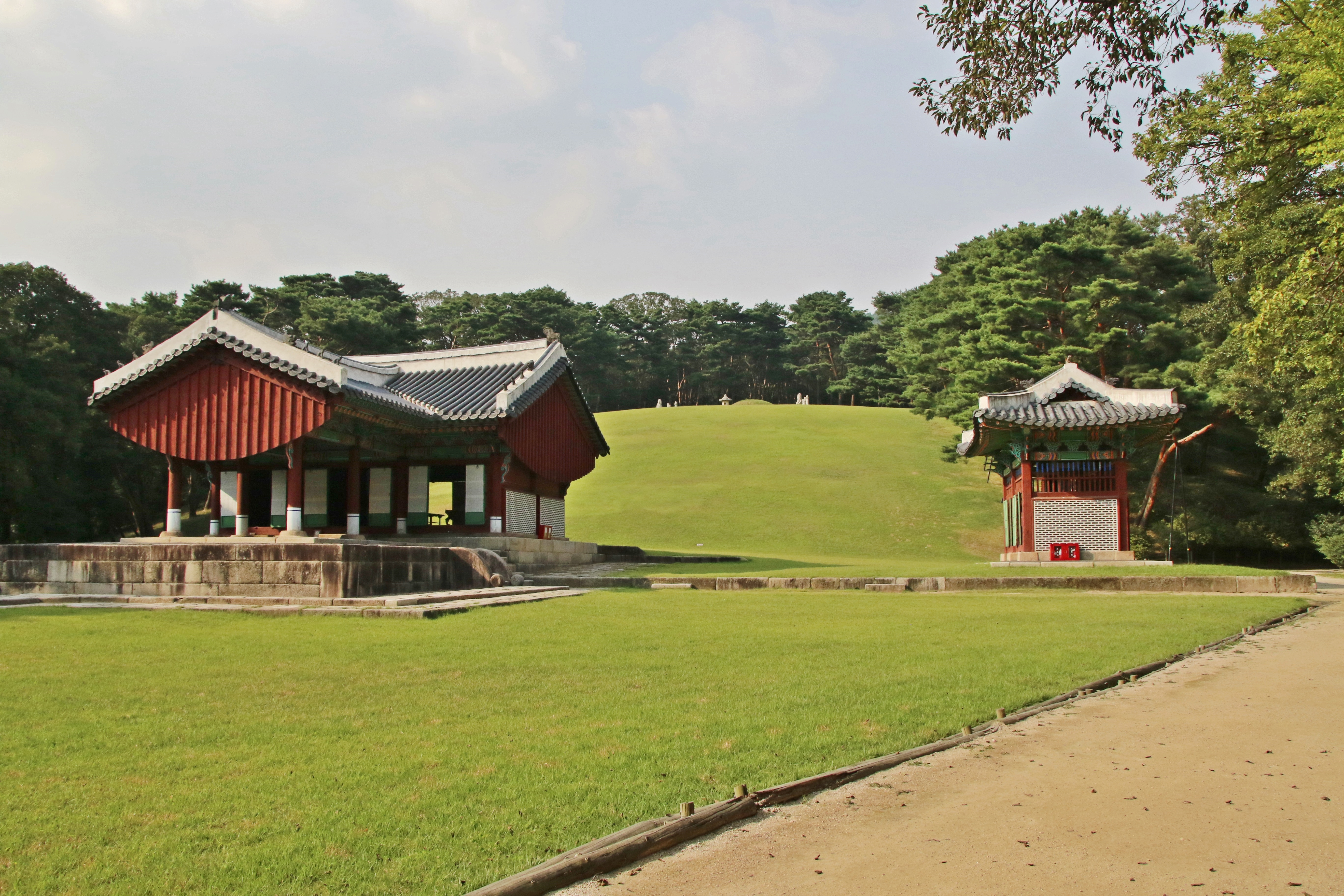 Back: Illeung Royal Tomb (인능) Front Left: T-shaped house (정자각) Front Right: Tombstone house (비각)